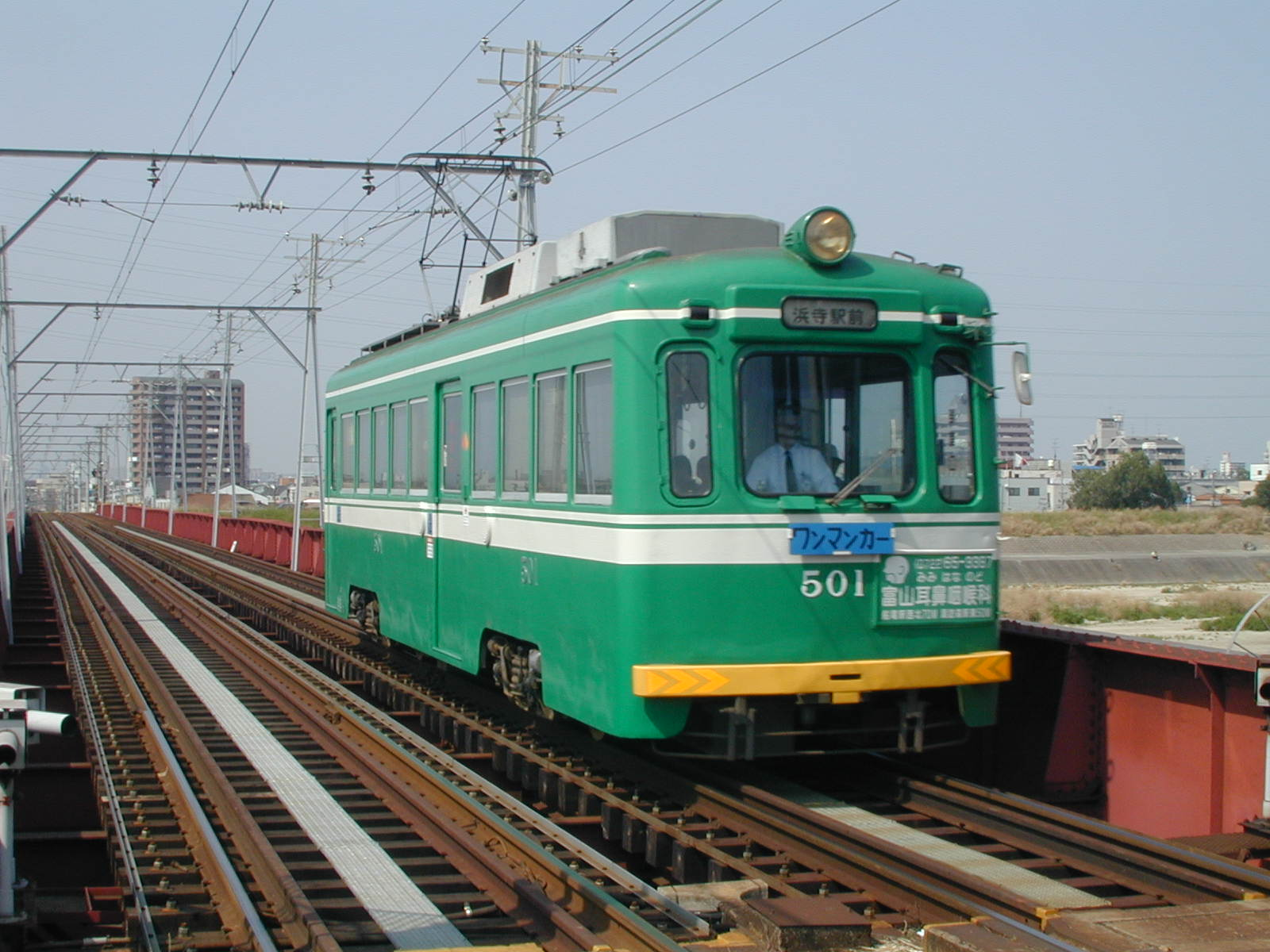 標準色時代のモ５０１号